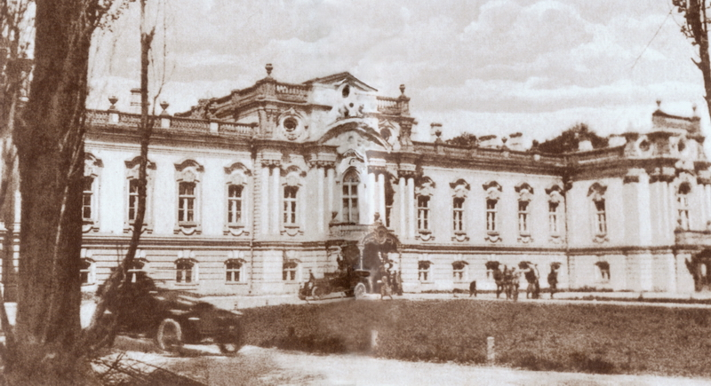 Мариинский дворец в Киеве, 1918 г.